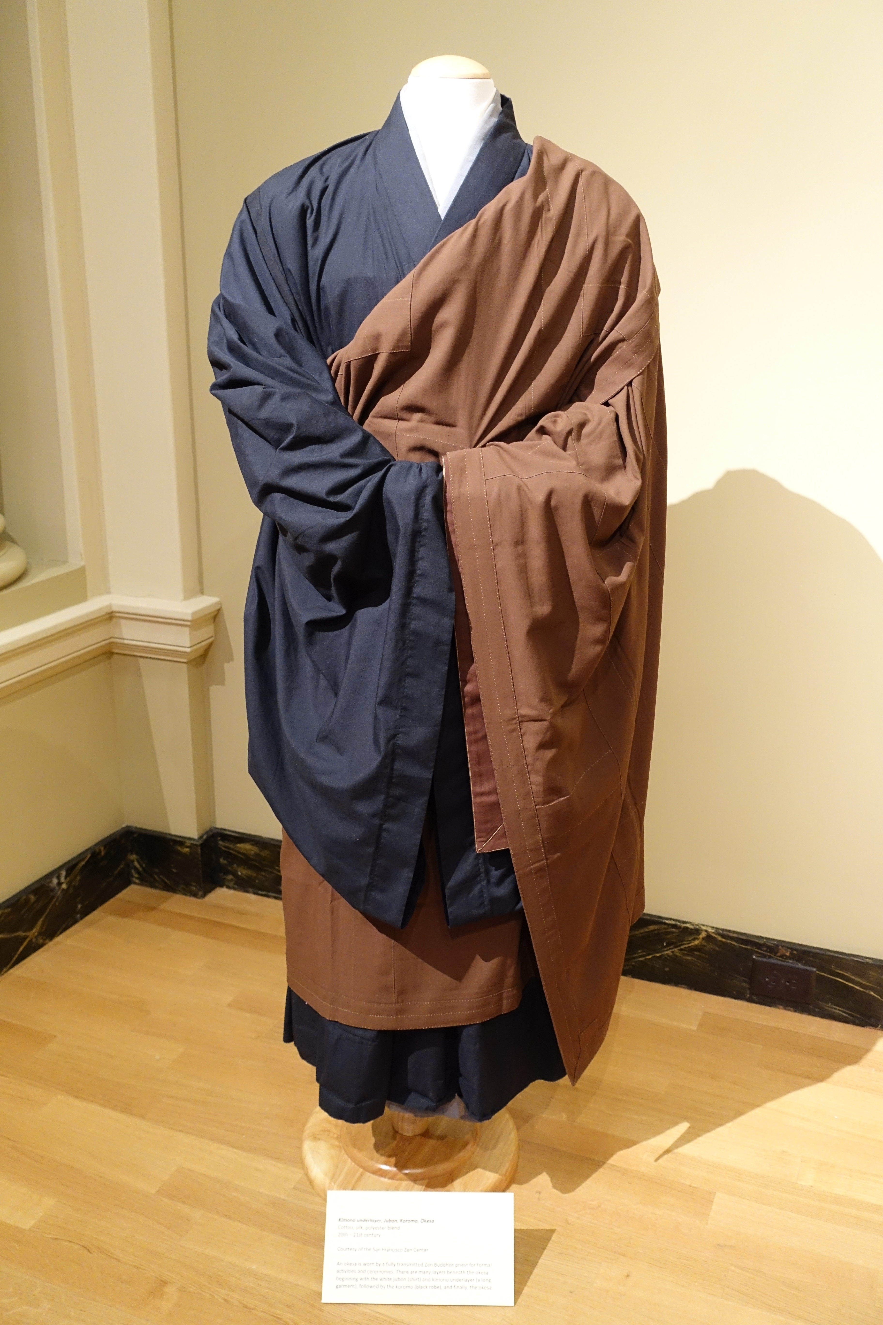 Kimono underlayer for Zen priest